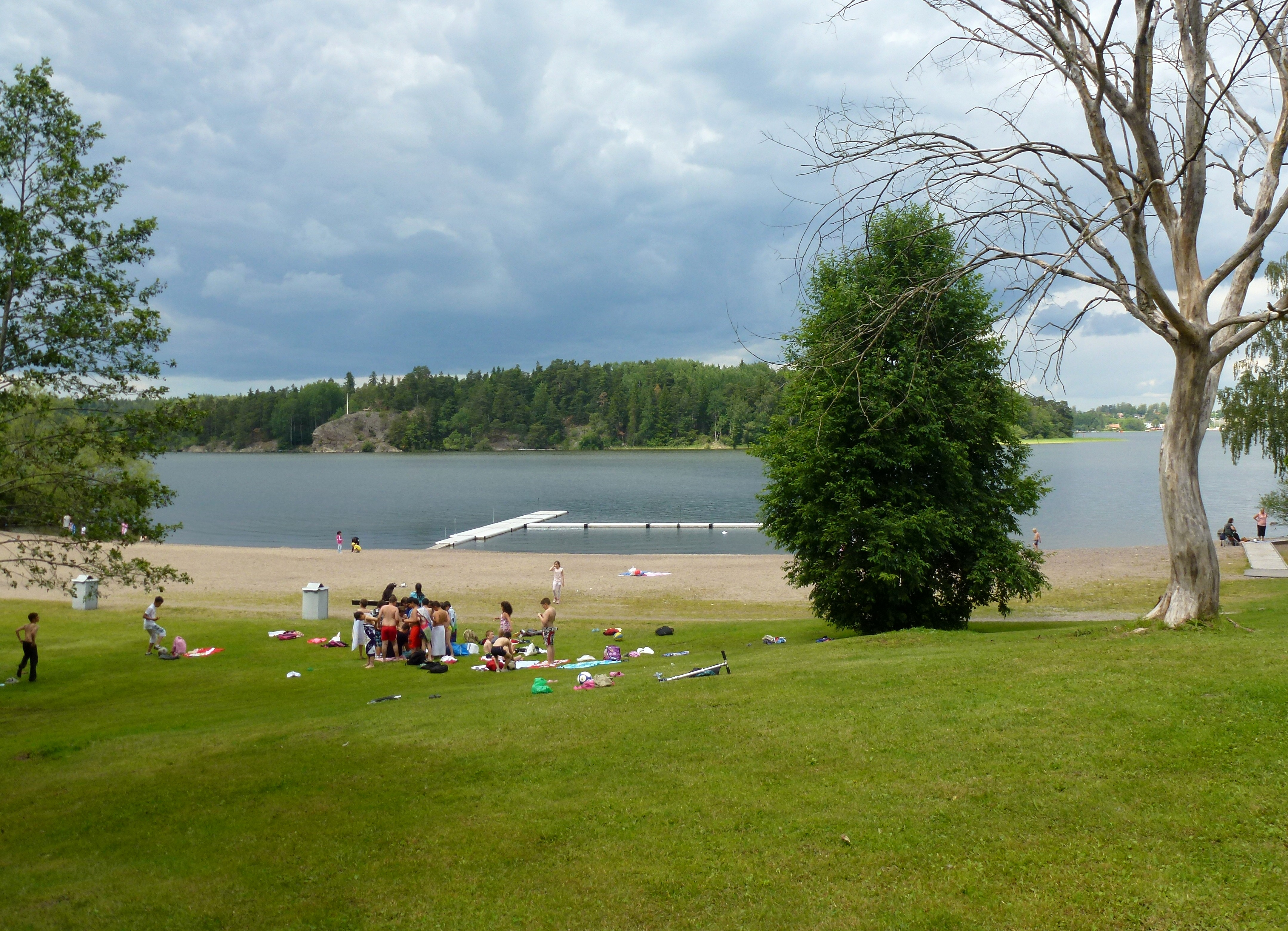 Slagstabadet, stranden